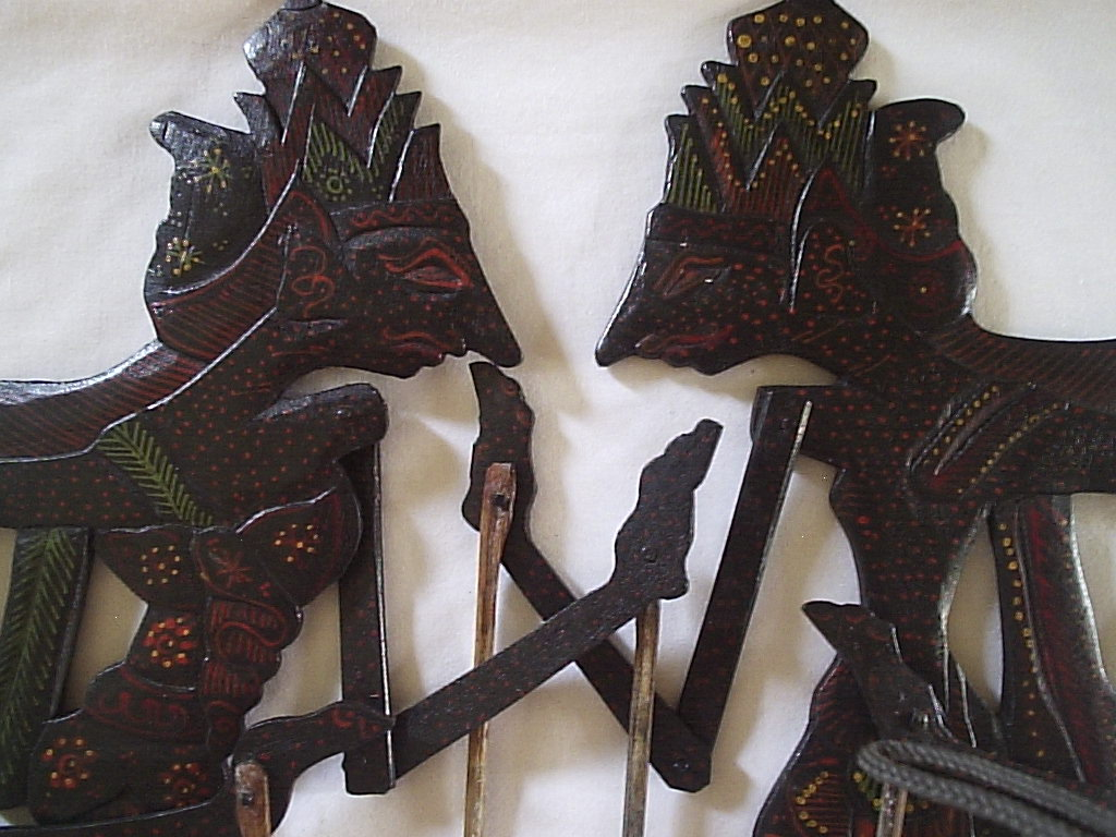 Wayang wooden puppets